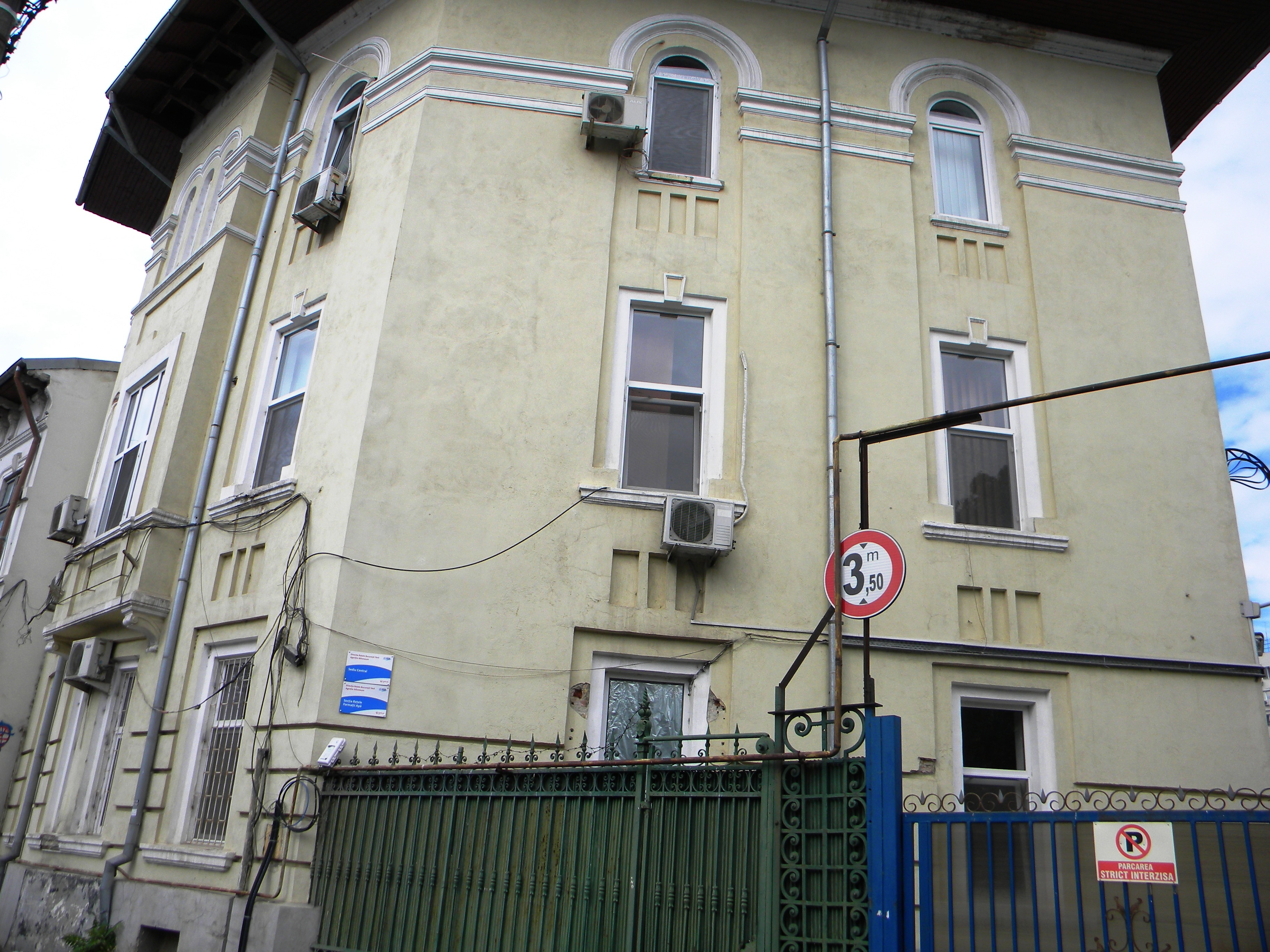 Bucuresti, Romania, Casa pe Calea Plevnei nr. 80 sect. 1